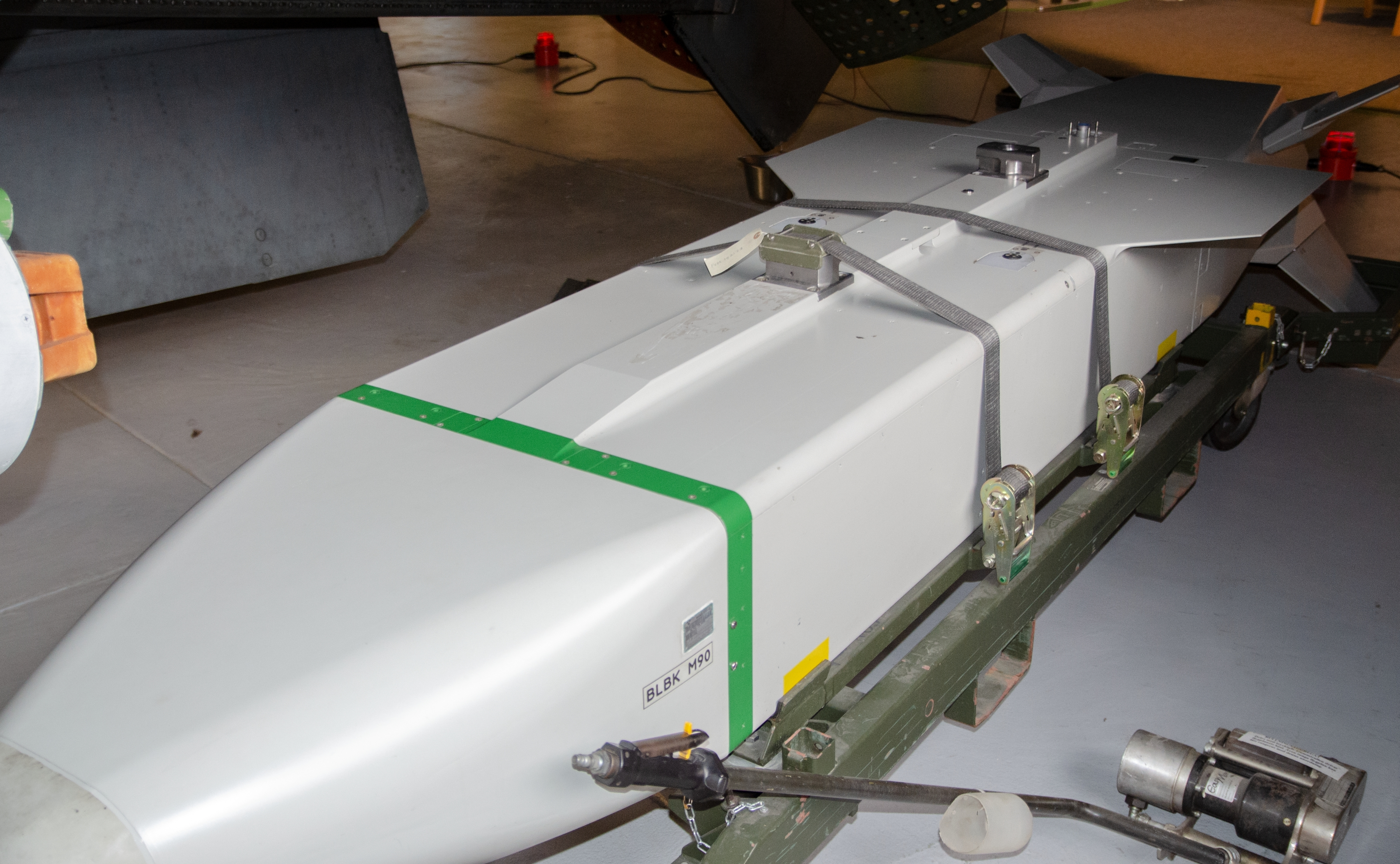 Bombkapsel blind M90